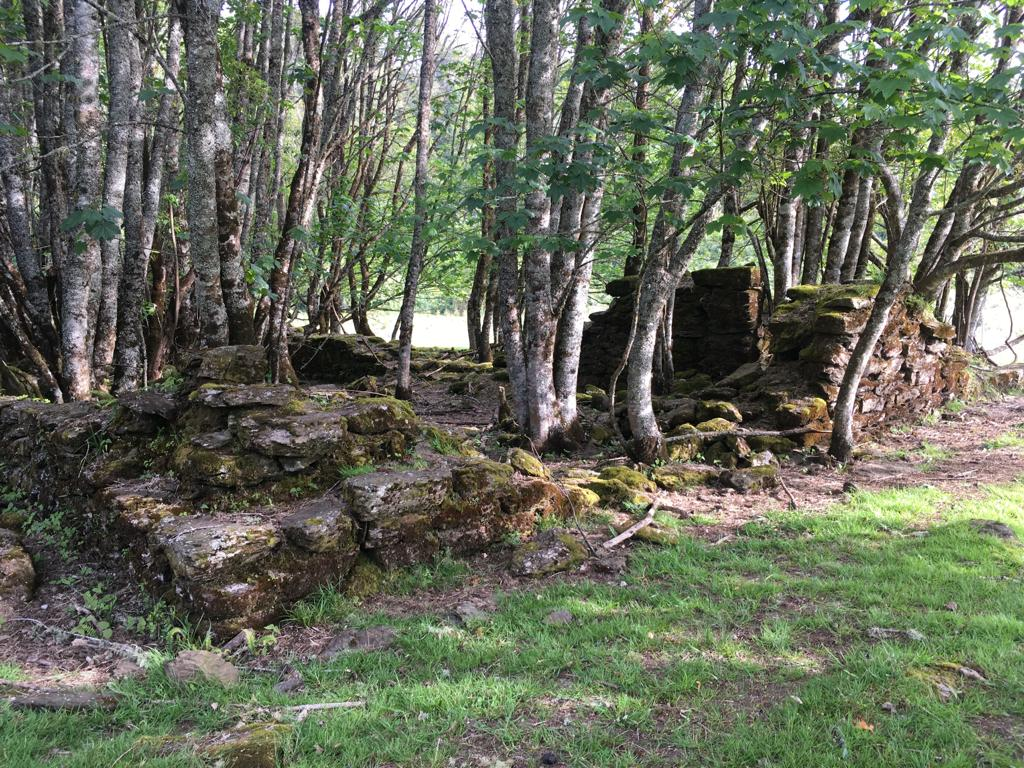 Ruinas de Misión de Quinchilca